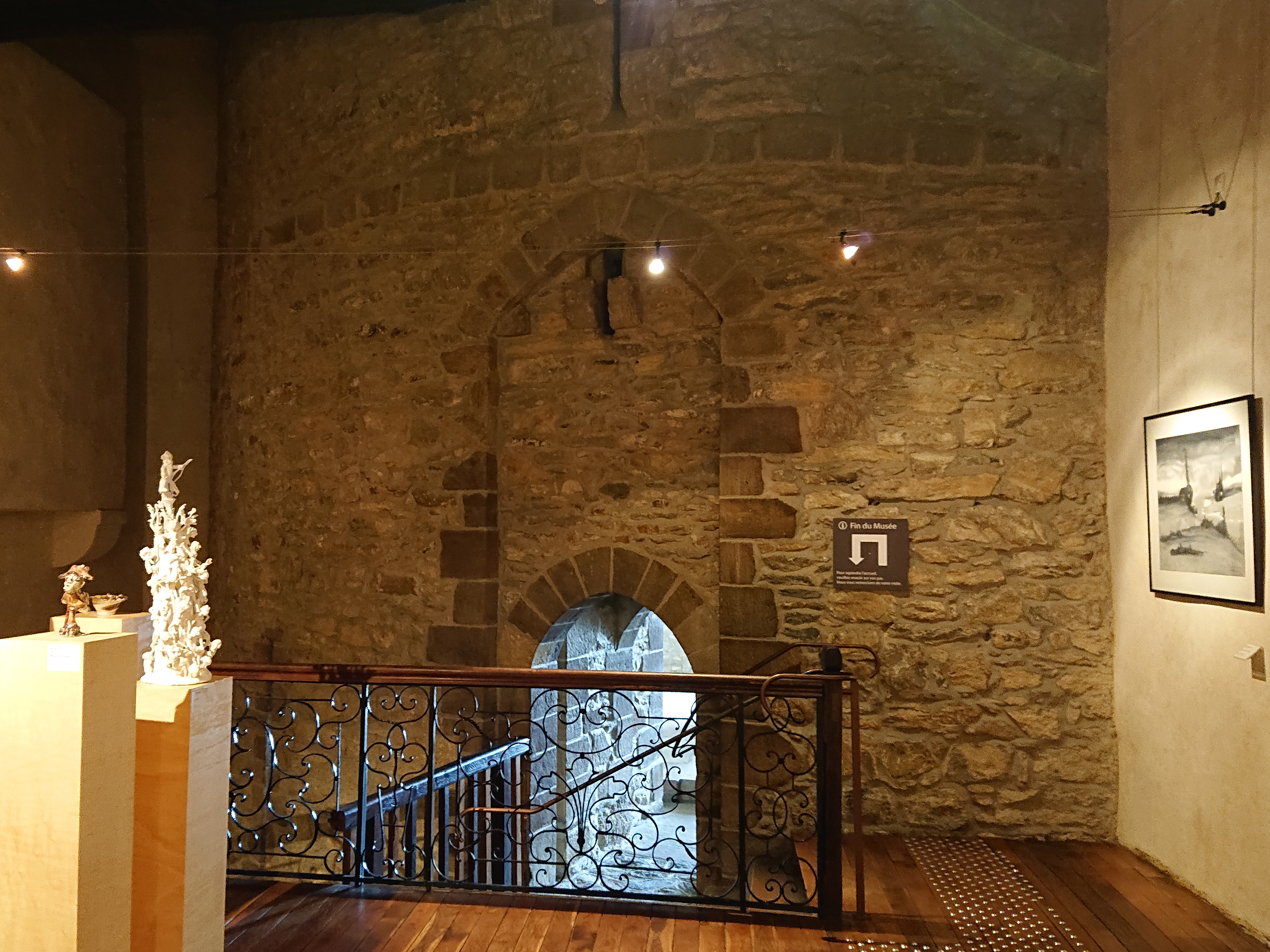 Entrée de la tour maîtresse du château de Laval.